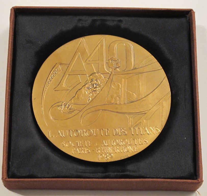 Médaille commémorative de l'inauguration de l'autoroute A40 (section Sylans - Châtillon-en-Michaille), décembre 1989. France.